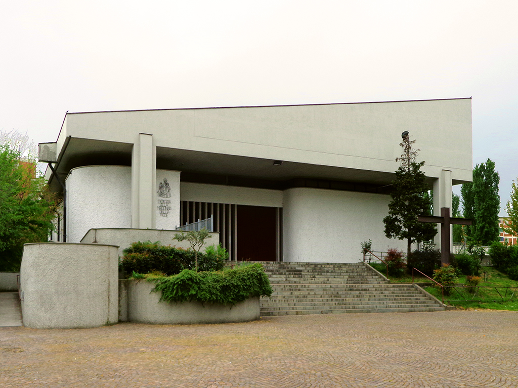 Milano, la chiesa della Madonna della Fede al quartiere degli Olmi.